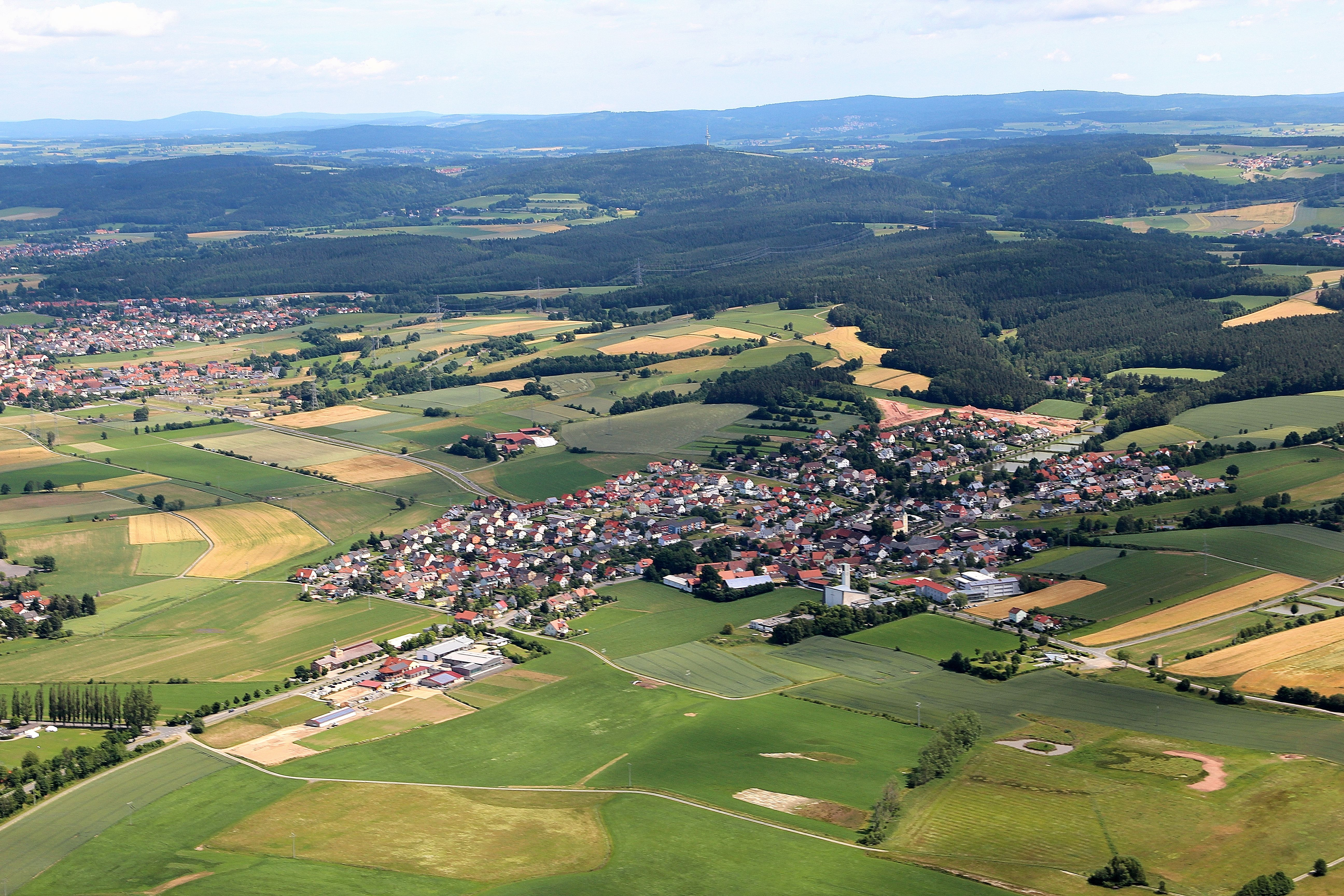 Pirk, Landkreis Neustadt an der Waldnaab, Oberpfalz, Bayern (2012)